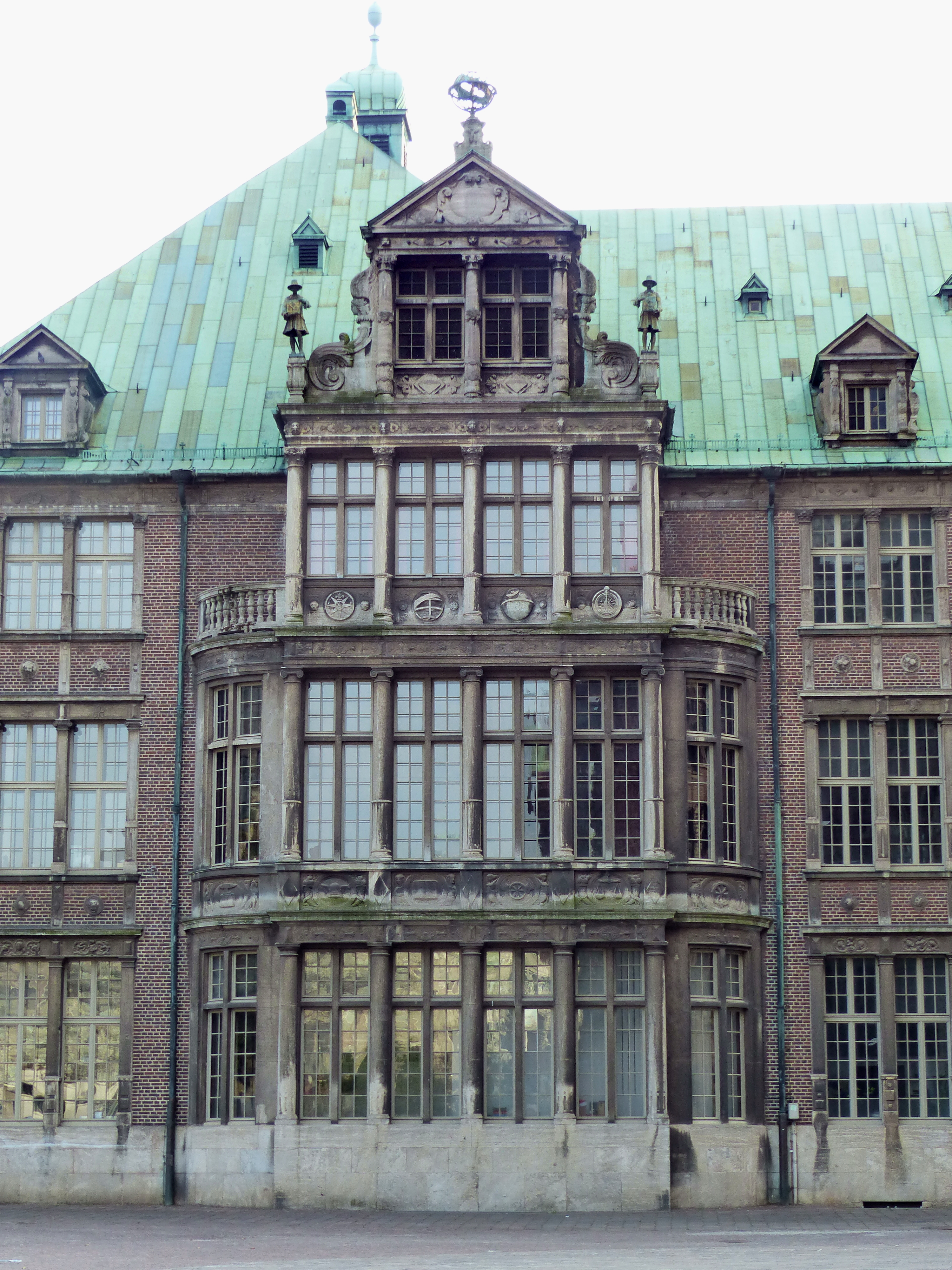 Senatserker an der Nordostseite des Neuen Rathauses in Bremen (vom Garagentor der Bremer Bank)